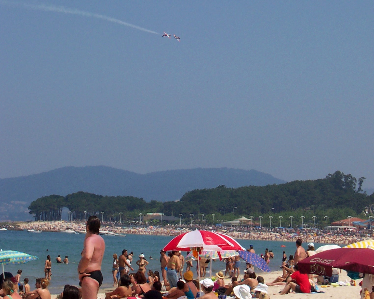 Festival aéreo de Vigo, 2004